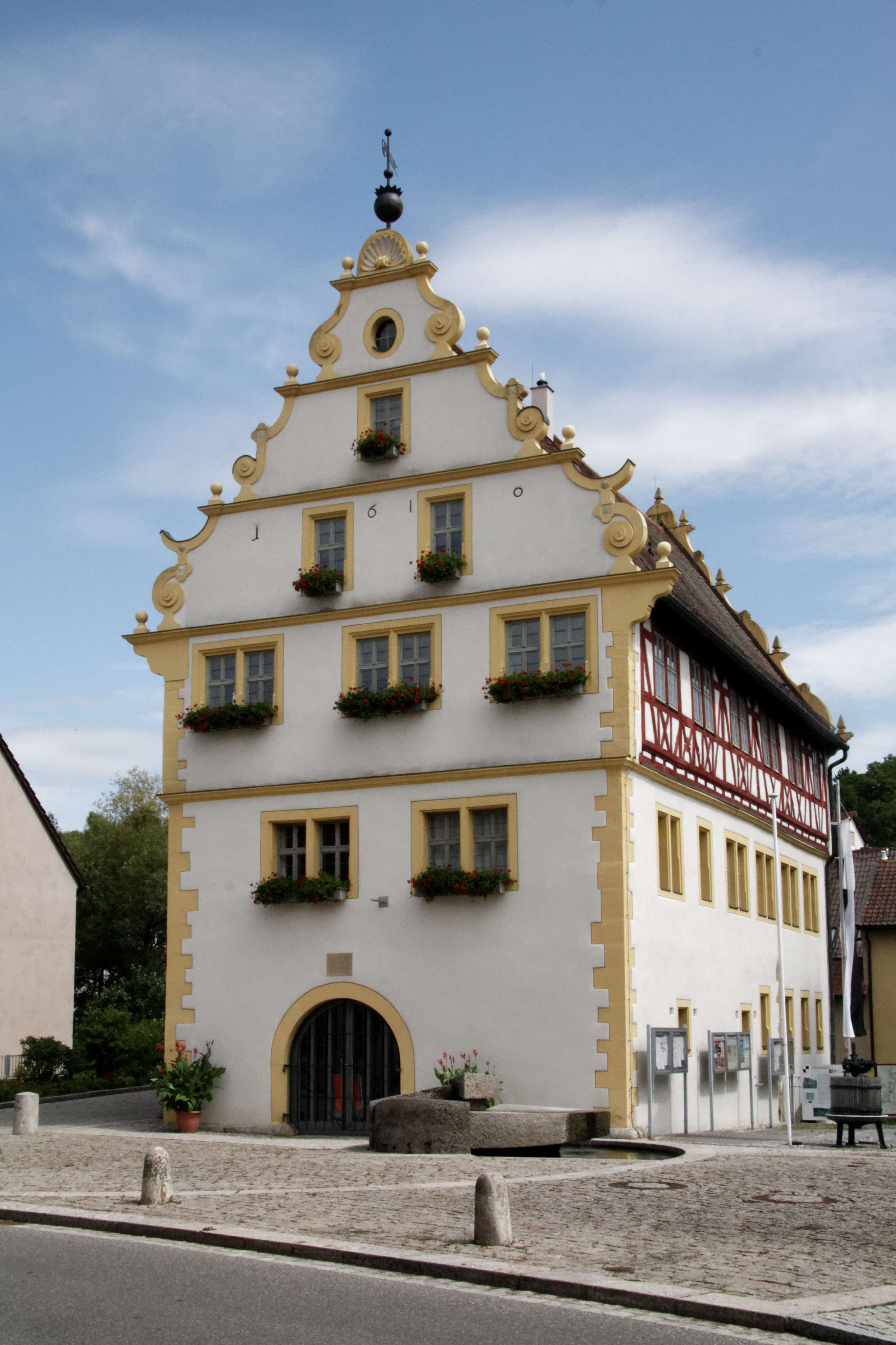 Obernbreit, Rathaus von Südwesten gesehen